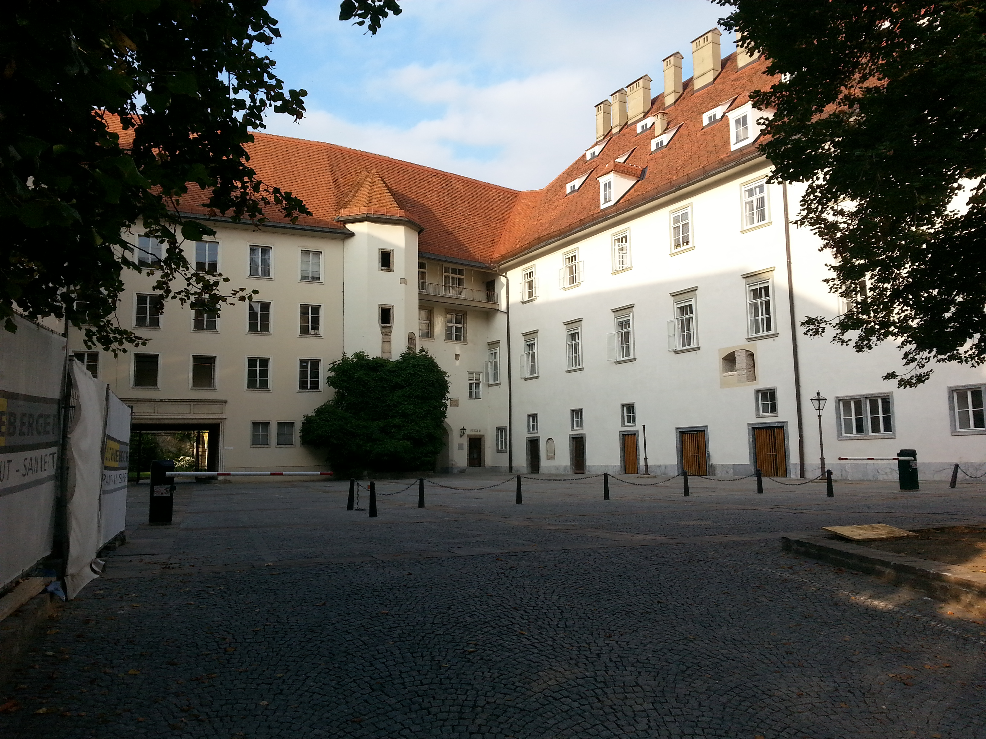 Burg, Sitz der Steirischen LR, Burgtor, Ausfallstor, Stadtm. und Graben, Bastion